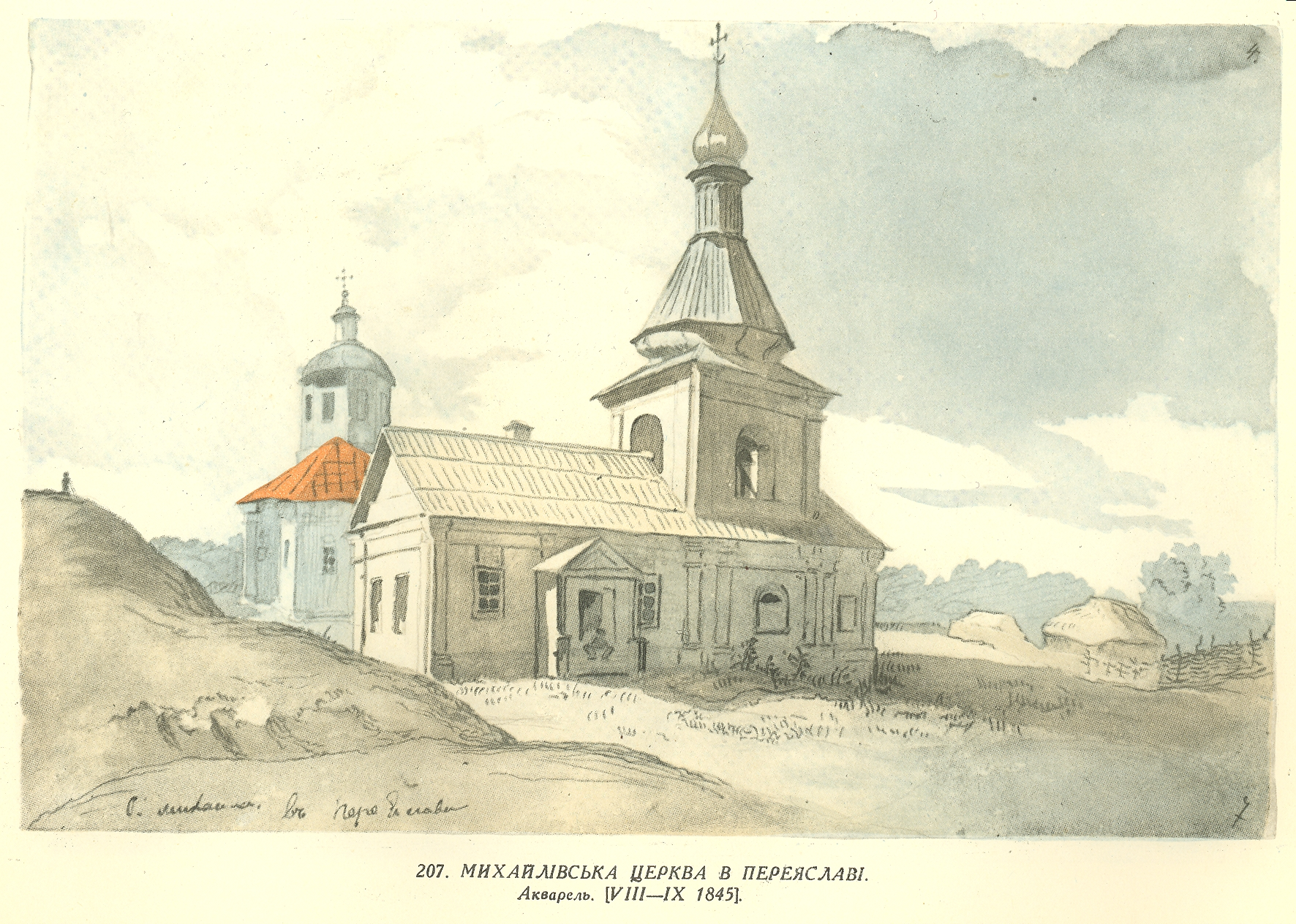 Тарас Шевченко. Повне зібрання творів в десяти томах. — К., 1961. — Т. 7: Живопис, графіка 1830-1847. — Кн. 1-2.